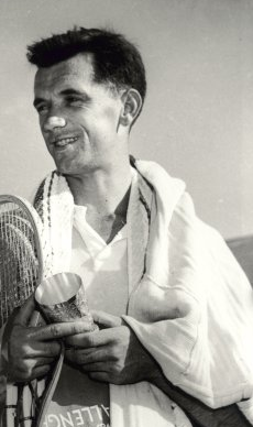 Mervyn Rose